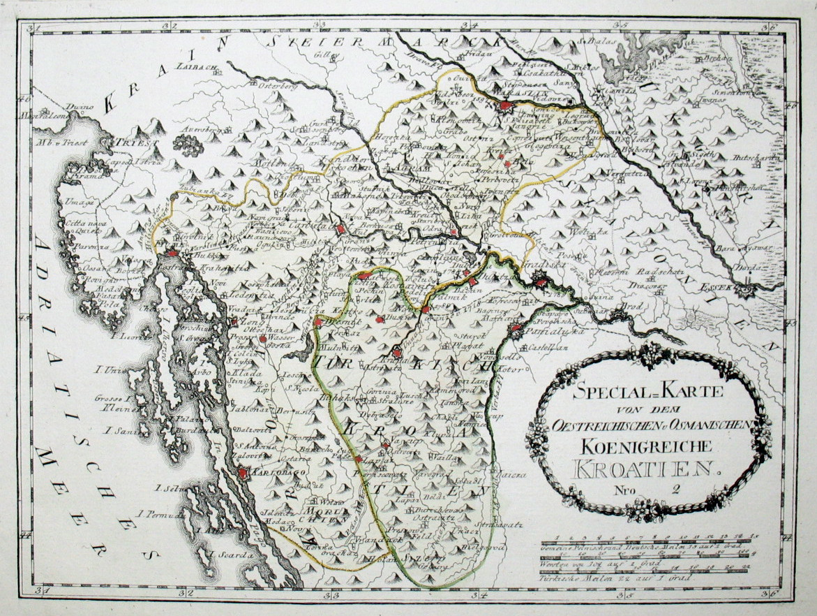 Special-Karte von dem Oestreichischen u. Osmanischen Koenigreiche Kroatien. Nro. 2. Kolorierter Kupferstich